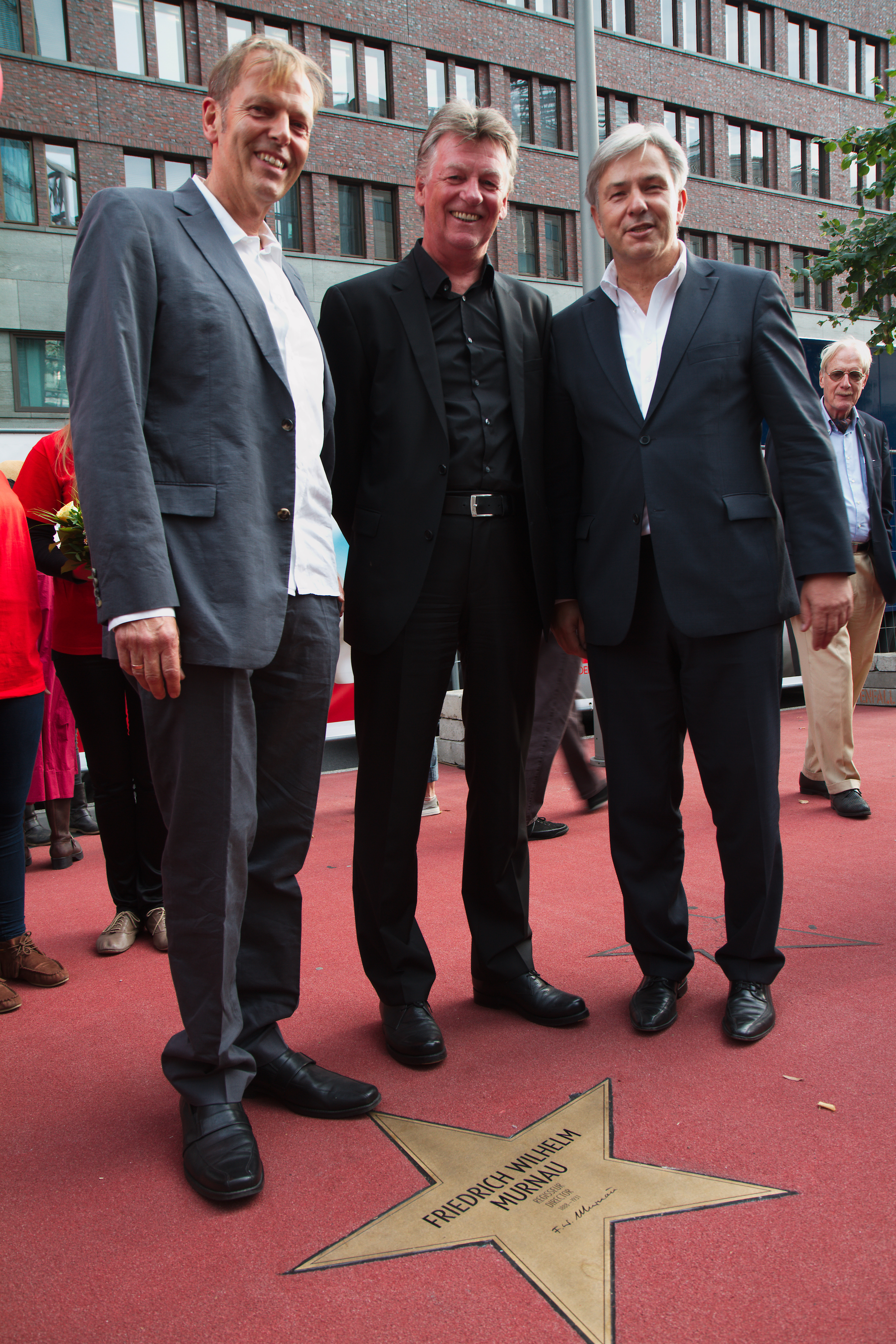 Bei der Einweihung des Sterns von Friedrich Wilhelm Murnau. rechts: Klaus Wowereit